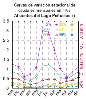 Curvas de variación estacional de la entrada de caudales al lago Peñuelas. ESTUDIO HIDROLÓGICO EMBALSE PEÑUELAS GSF Ingenieros Ltda. Diciembre 2013 url: mes 5% 20% 50% 85% 90% 95% ene 1.257 0.852 0.541 0.264 0.211 0.138 feb 1.136 0.756 0.464 0.204 0.154 0.086 mar 0.605 0.470 0.328 0.154 0.112 0.051 abr 0.743 0.410 0.208 0.082 0.065 0.046 may 1.084 0.610 0.258 0.057 0.037 0.018 jun 3.004 1.155 0.425 0.124 0.092 0.060 jul 2.937 1.224 0.490 0.158 0.121 0.082 ago 1.976 0.999 0.489 0.203 0.165 0.121 sep 1.030 0.575 0.272 0.082 0.060 0.037 oct 0.560 0.464 0.350 0.187 0.145 0.079 nov 0.861 0.656 0.440 0.223 0.183 0.134 dic 1.115 0.864 0.602 0.278 0.202 0.088